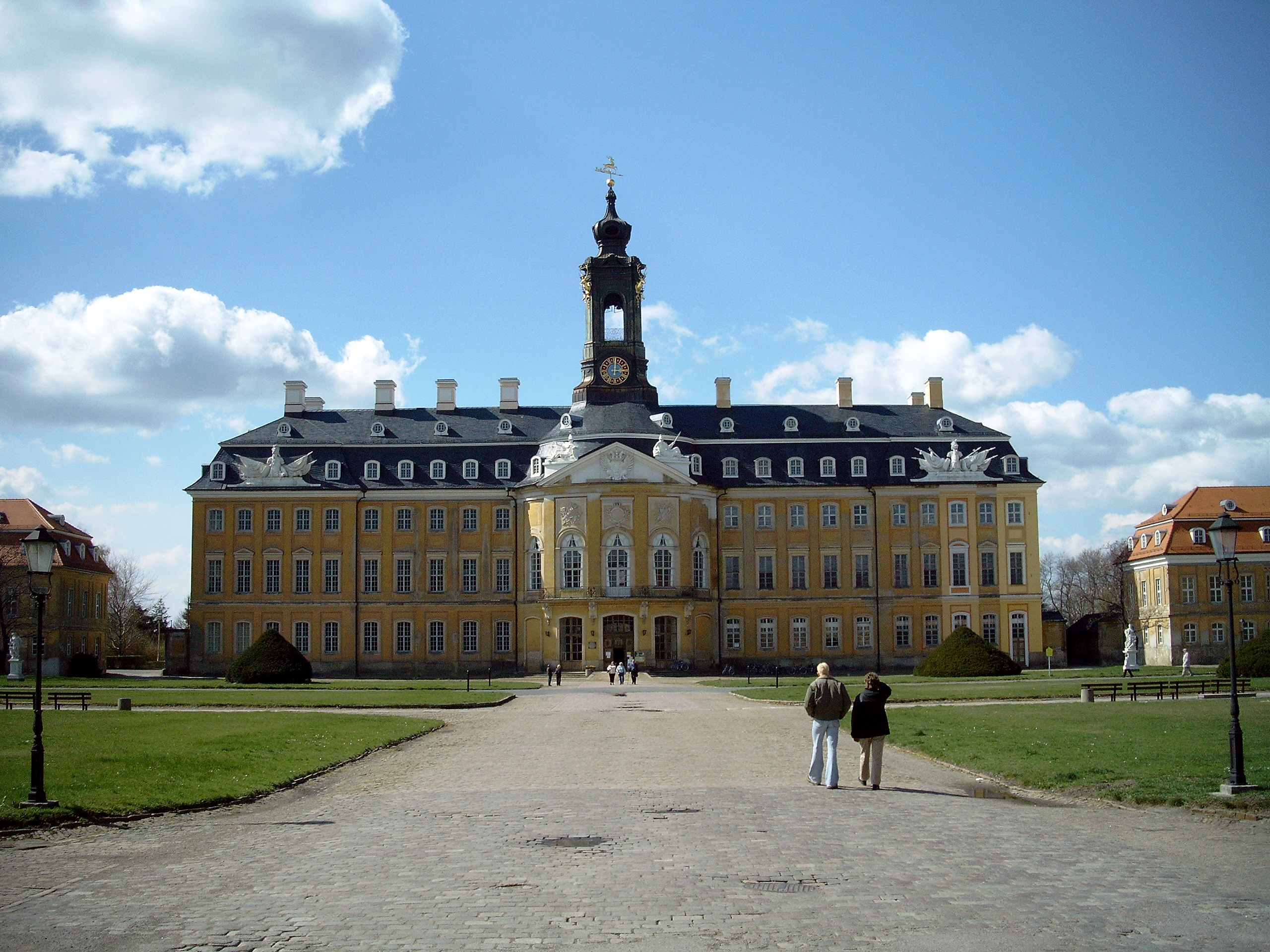 Hubertusburg im sächsischen Wermsdorf im Frühjahr 2004 Quelle: selbst fotografiert Fotograf/Zeichner: Marco Linke Datum: 11.04.2004